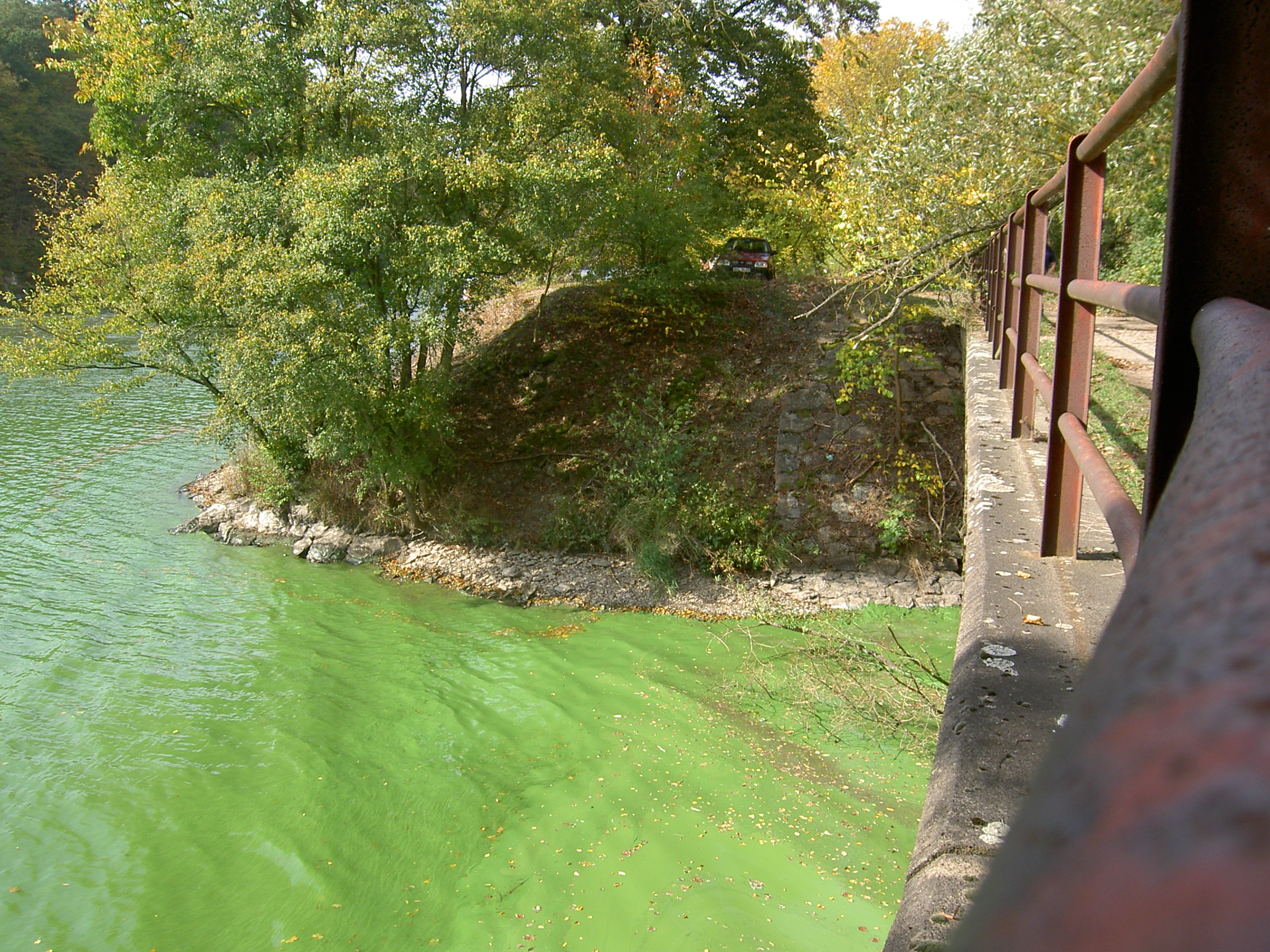 Brněnská přehrada, kvalita vody